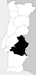 Antigua provincia del Alto Alentejo Former province of Alto Alentejo, Portugal Created by User:Brian Boru in September 2005, based on a map created by Jorge Candeias.